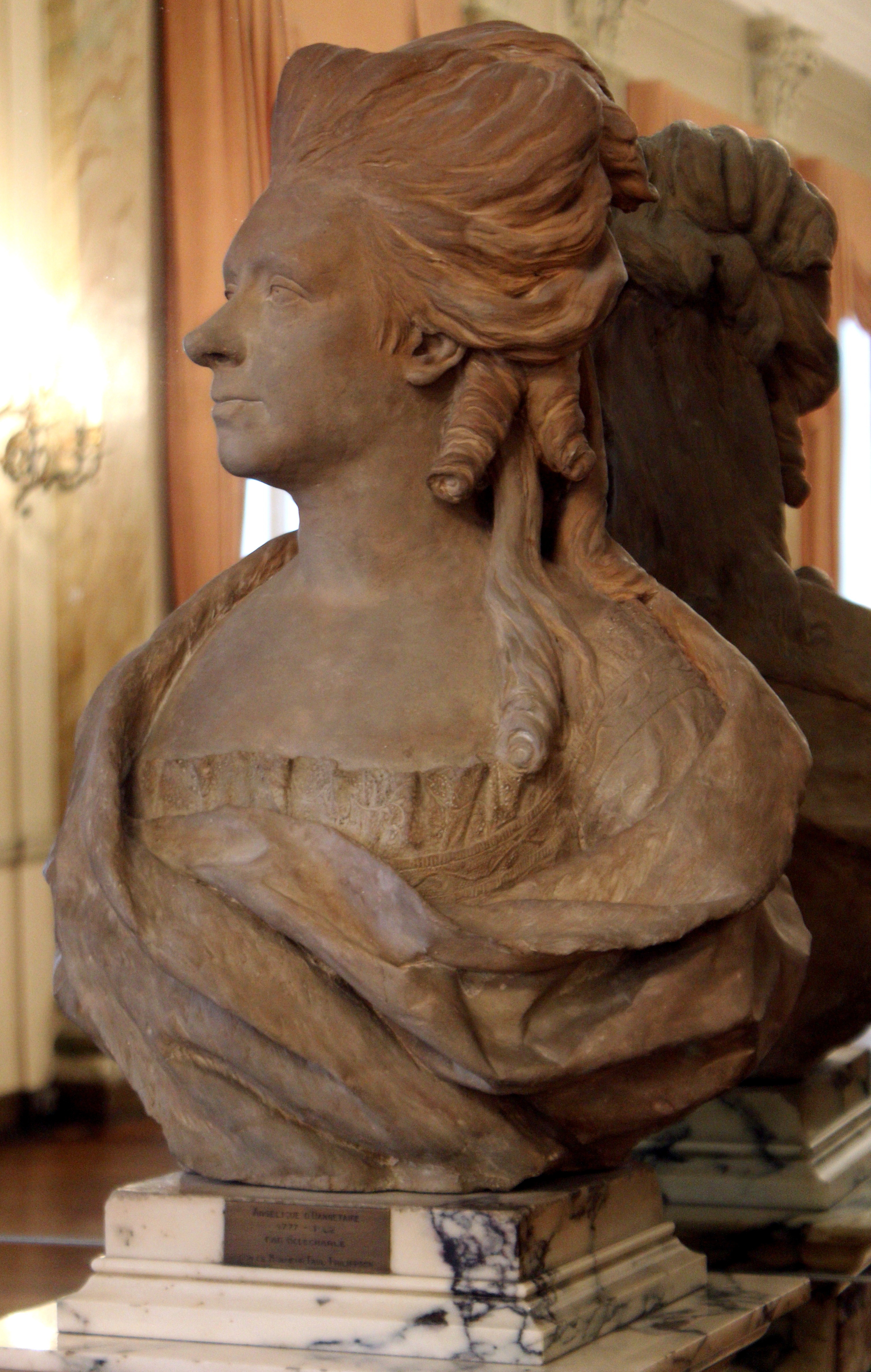 Buste d'Angélique d'Hannetaire par Gilles-Lambert godecharle dans la salle de Lorraine au Cercle Royal Gaulois Artistique et Littéraire à Bruxelles